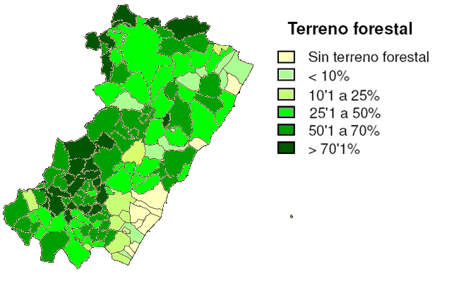 Mapa forestal de la provincia de Castellón